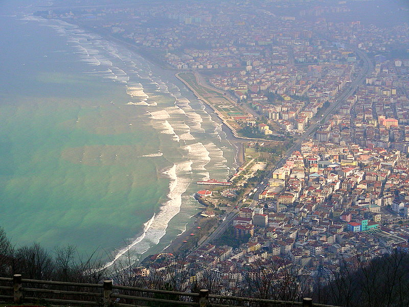 From Boztepe taken.